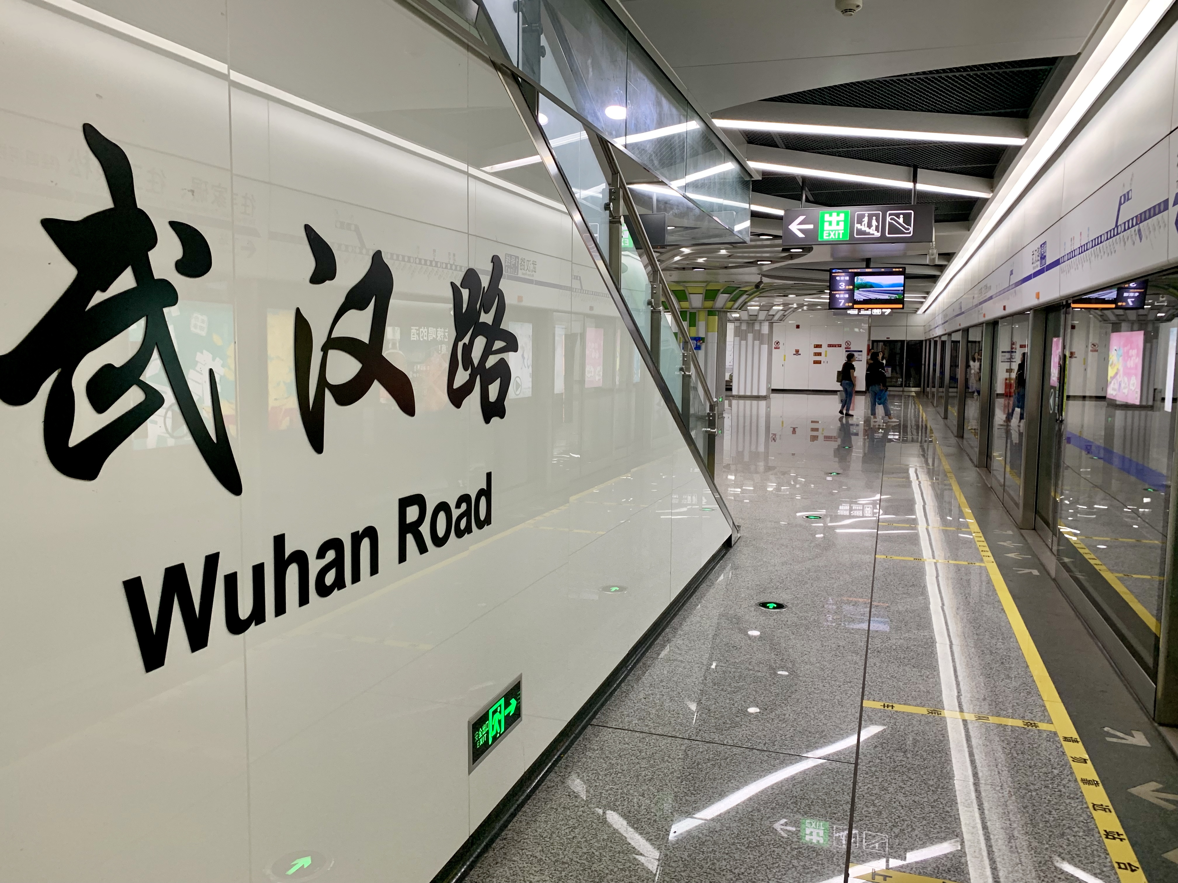 成都地铁武汉路站